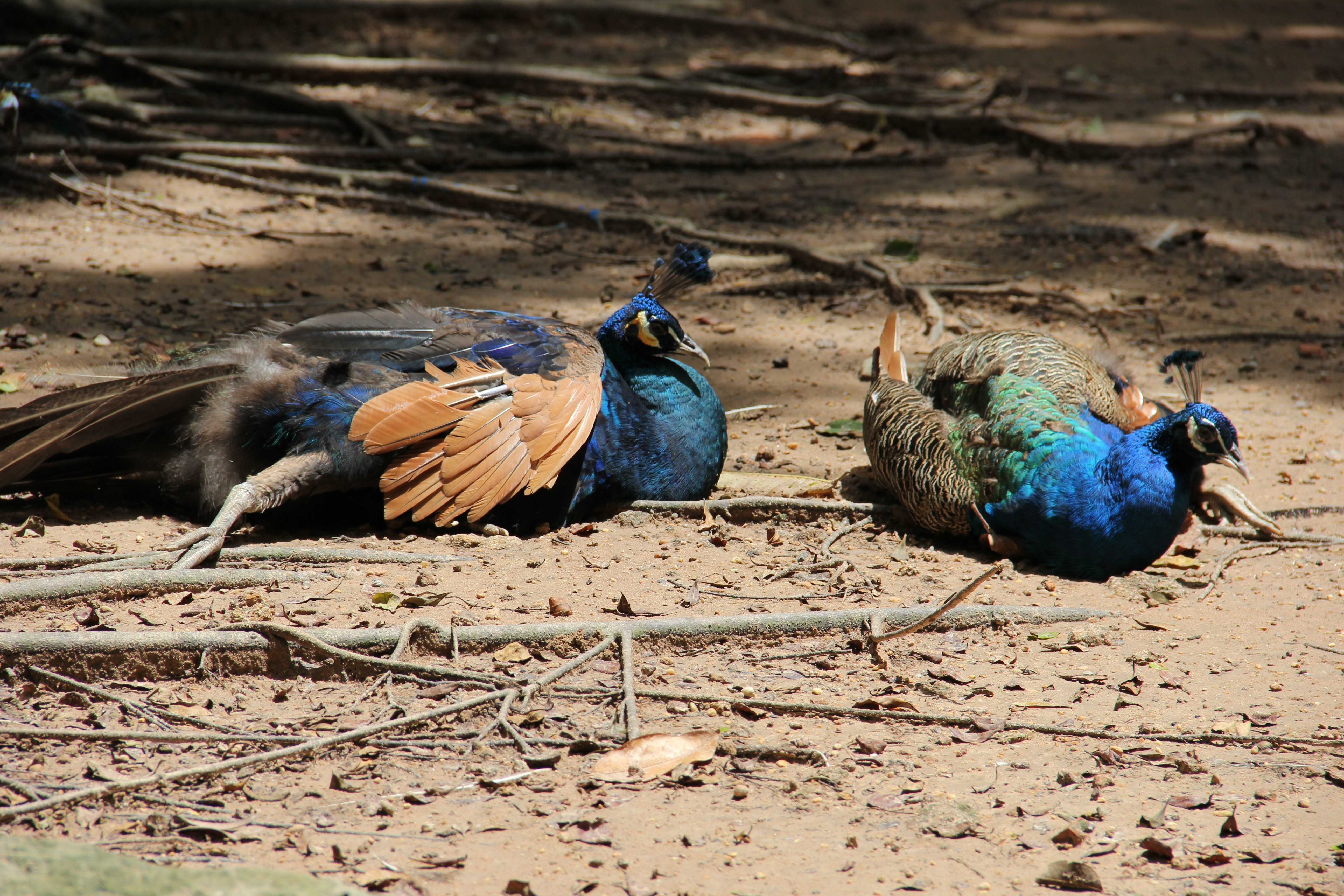 Hình tự chụp bằng máy ảnh kỷ thuật số về một cặp công xanh Việt Nam ở Khu du lịch Đại Nam